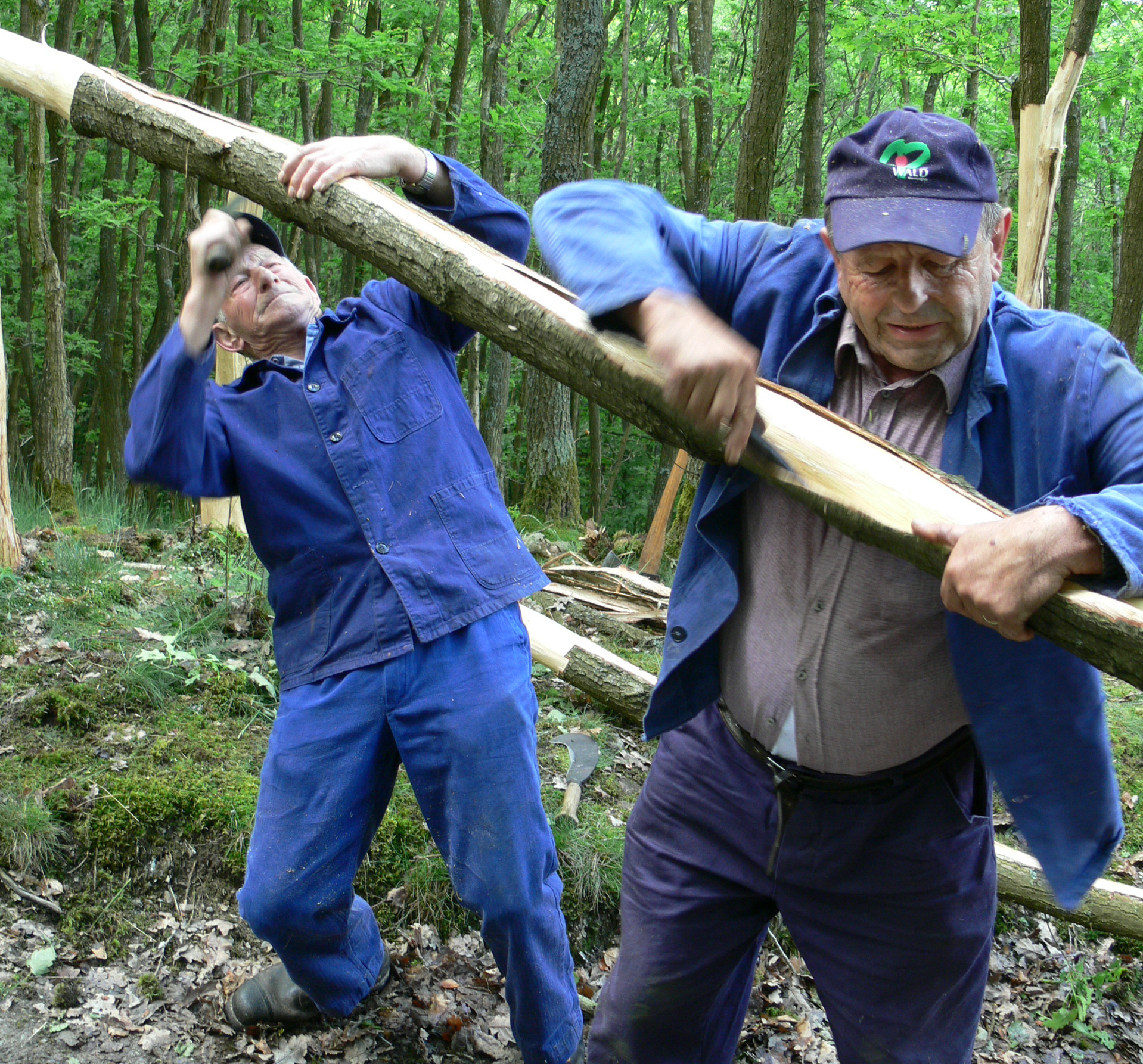 Bild aus dem Fotoarchiv der VG Kirn-Land.